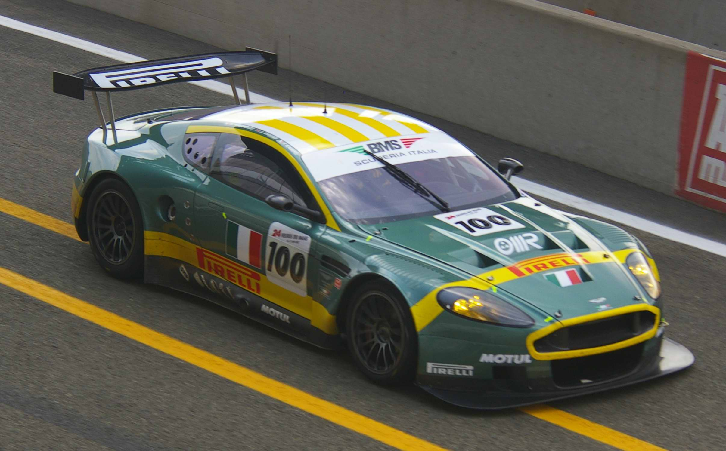 Entrée dans les stands de l'Aston Martin DBR9 de l'équipage 100 (Fabio Babini, Jamie Davies et Matteo Malucelli) lors de la journée test des 24h du Mans du 03 juin 2007.